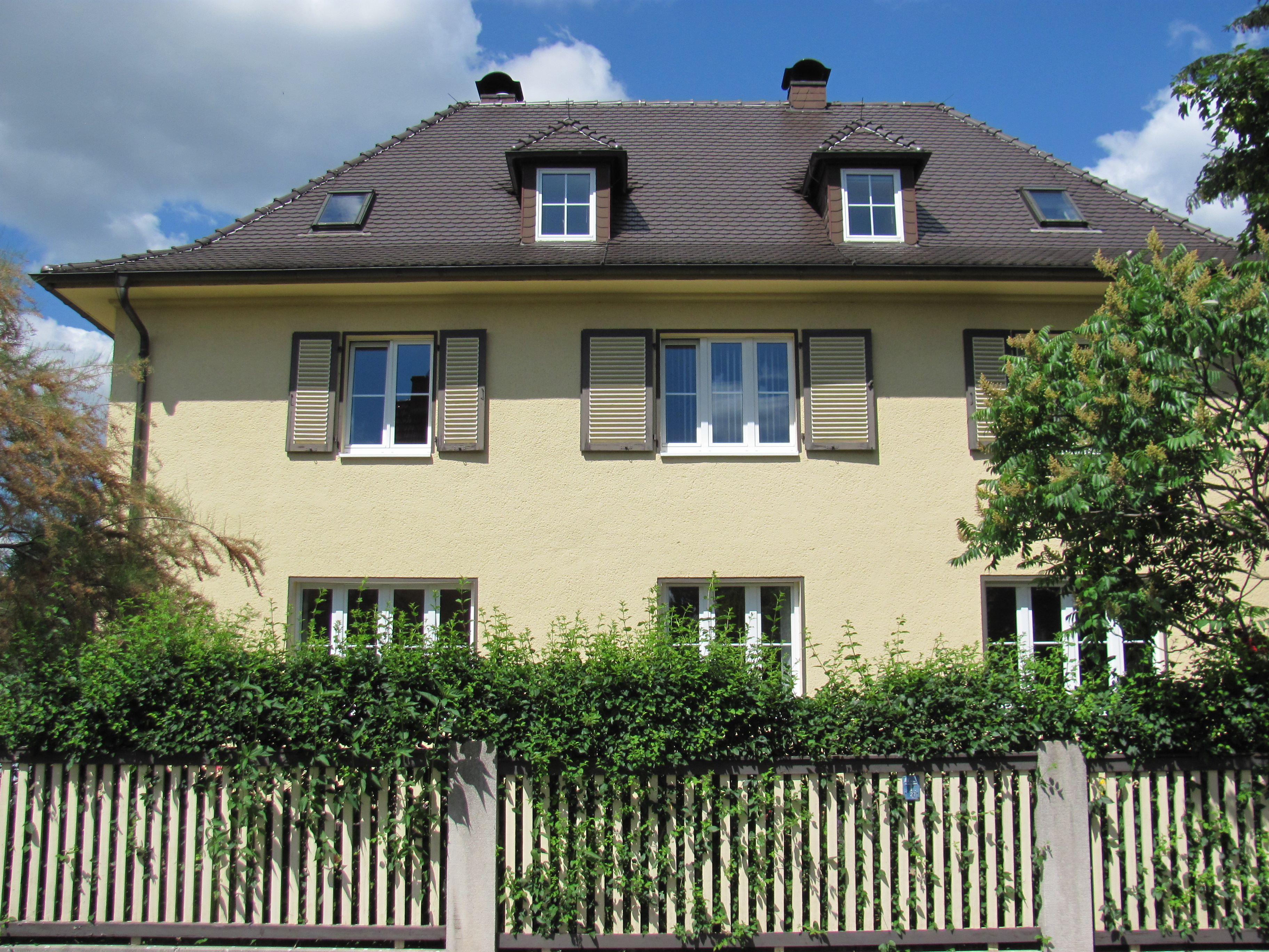 Fehlende Kulturdenkmale nach Wikipedialiste in Heinrich-Heine-Straße, Horst-Vieth-Straße, Humboldtstraße, Dr-Rudolf-Friedrichstraße